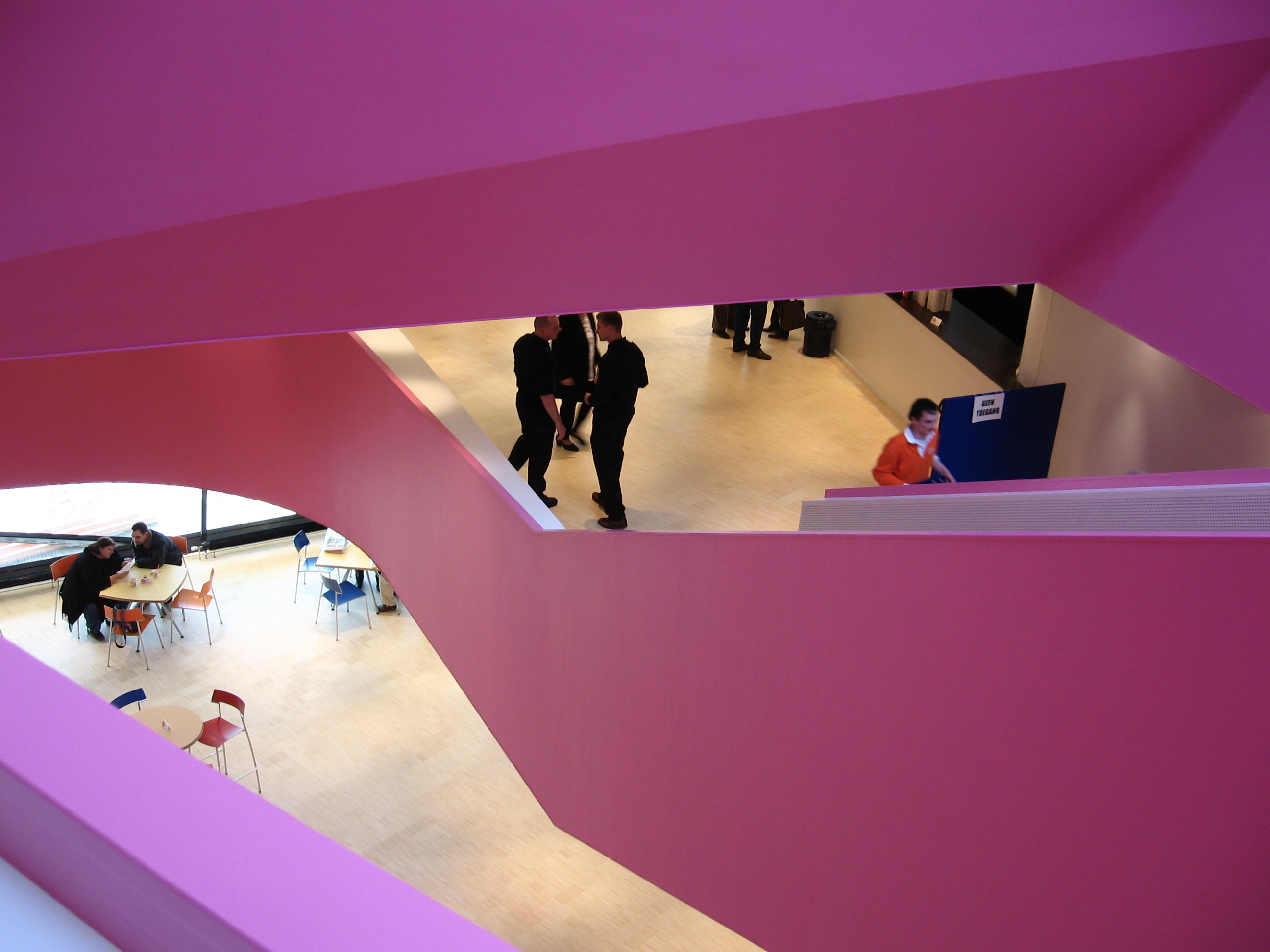 Het interieur van het nieuwe agoratheater: de foyer